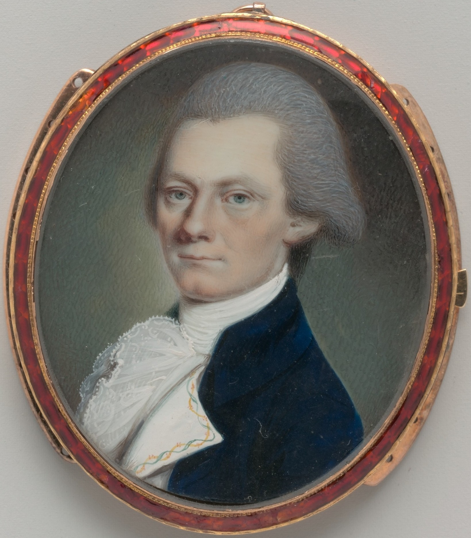 Painting, miniature; Paintings